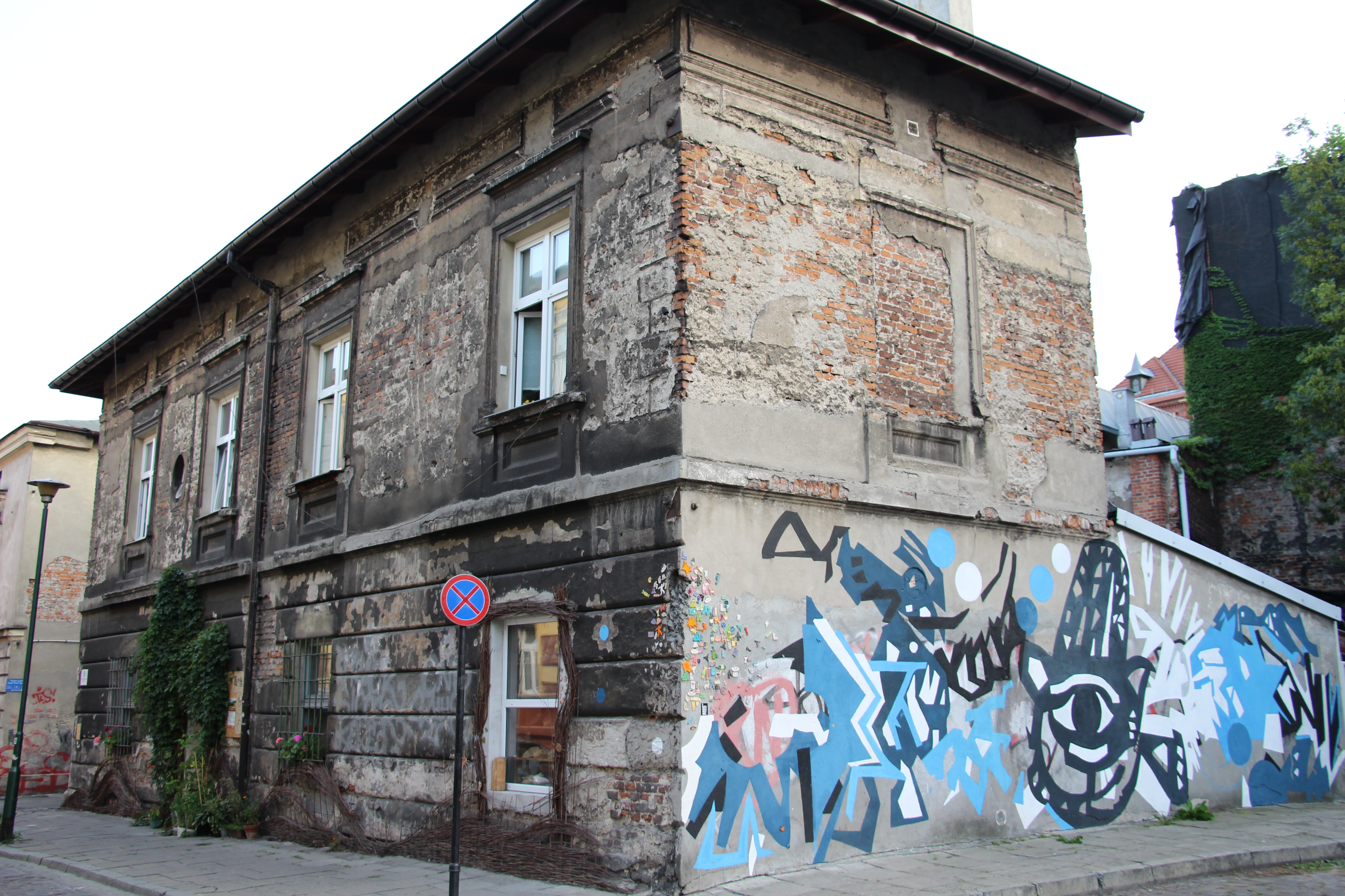 Kazimierz. Bartosza Mural